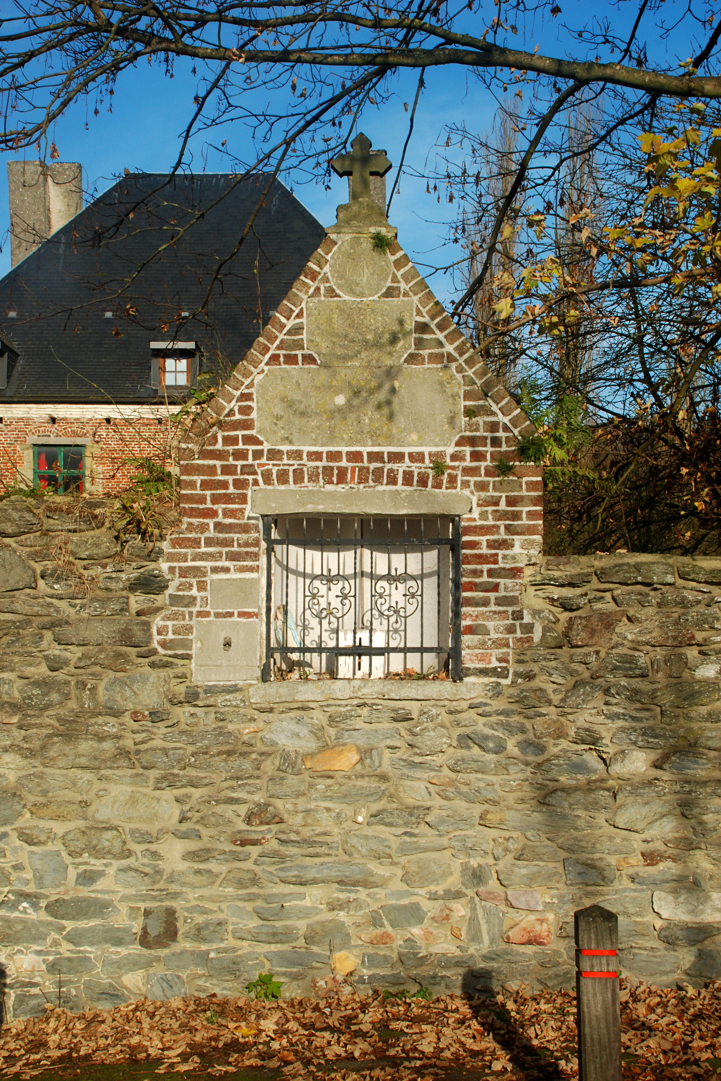 Belgique - Brabant wallon - Ottignies - Manoir de Franquenies